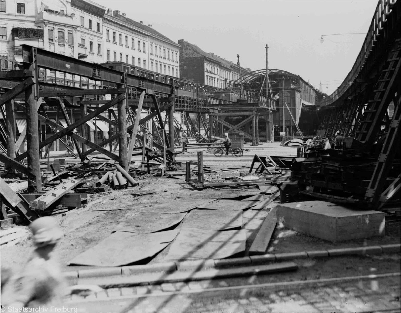 Umbau des U-Bahnhofes Kottbusser Tor